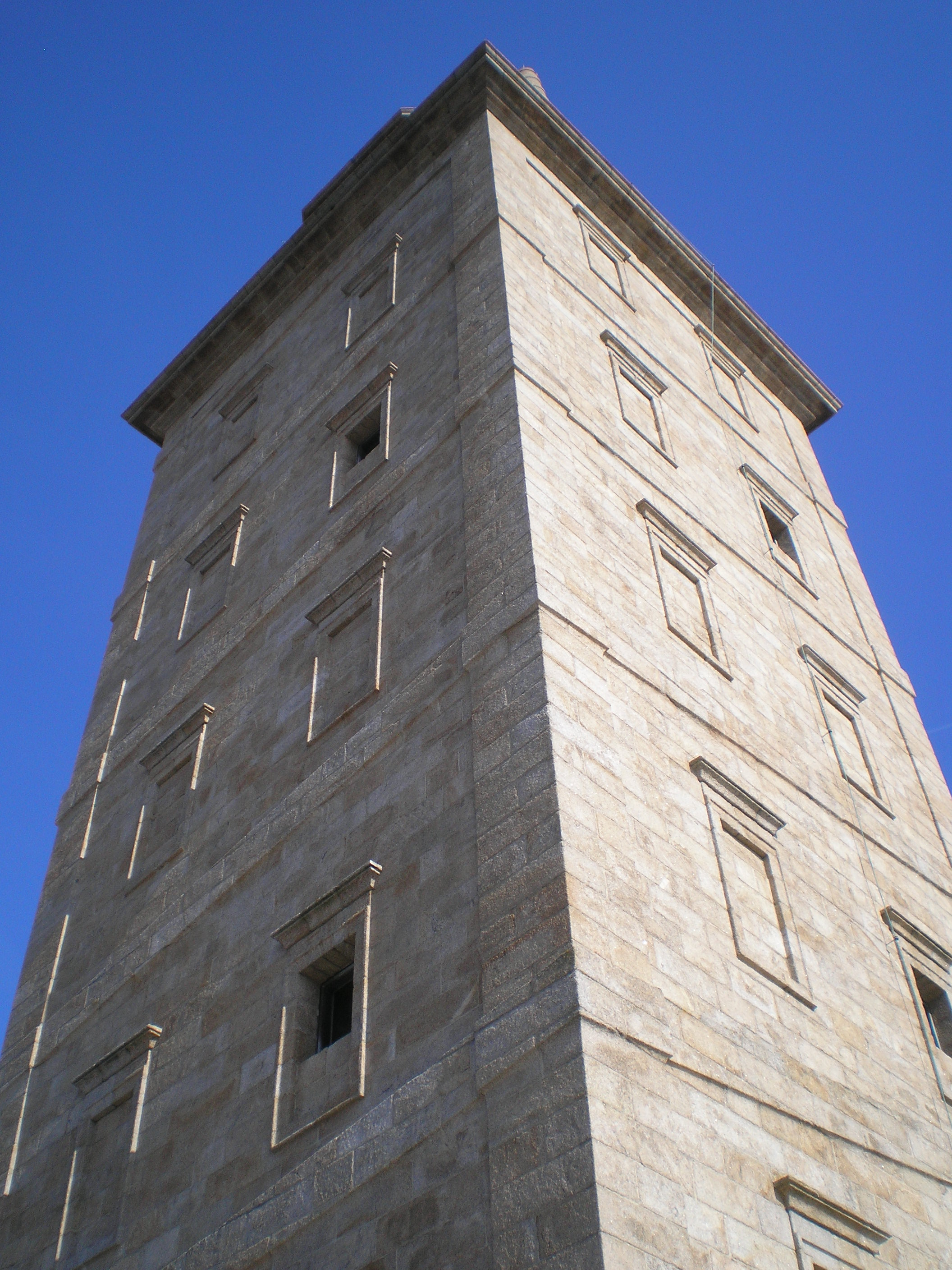 Torre de Hércules desde su base.